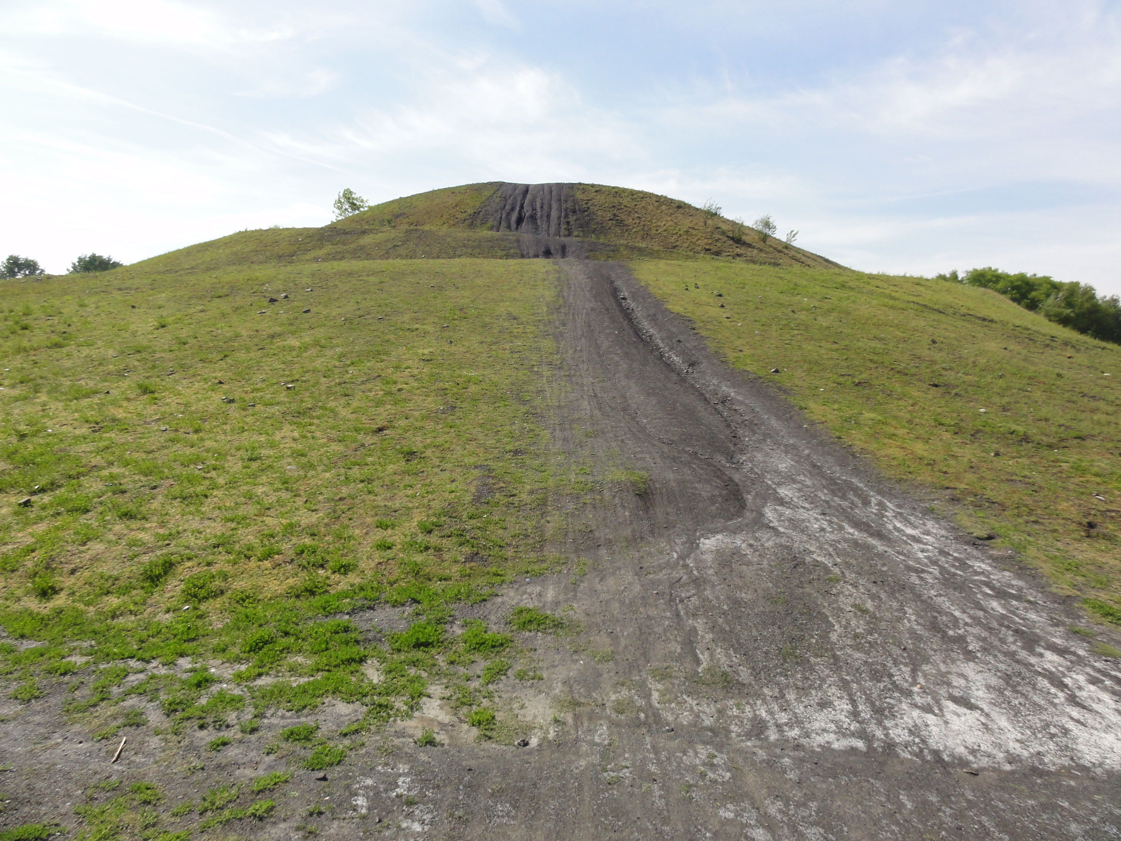 Terril n° 169 dit Lavoir de Lourches, Lavoir de Lourches de la Compagnie des mines de Douchy, Bouchain, Nord, Nord-Pas-de-Calais, France.